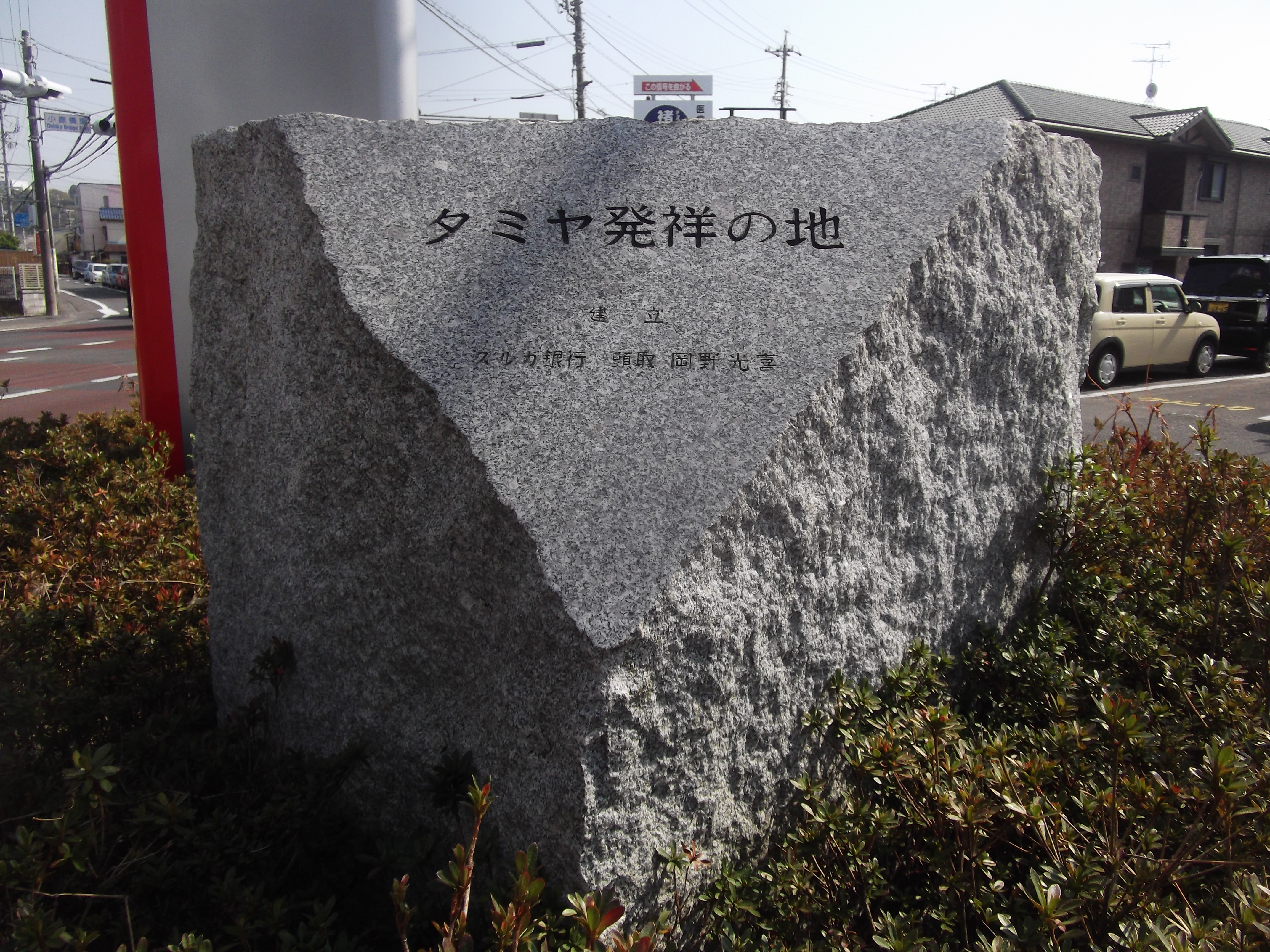 タミヤ発祥の地の石碑。静岡市駿河区小鹿、スルガ銀行静岡東支店の駐車場の端にある。